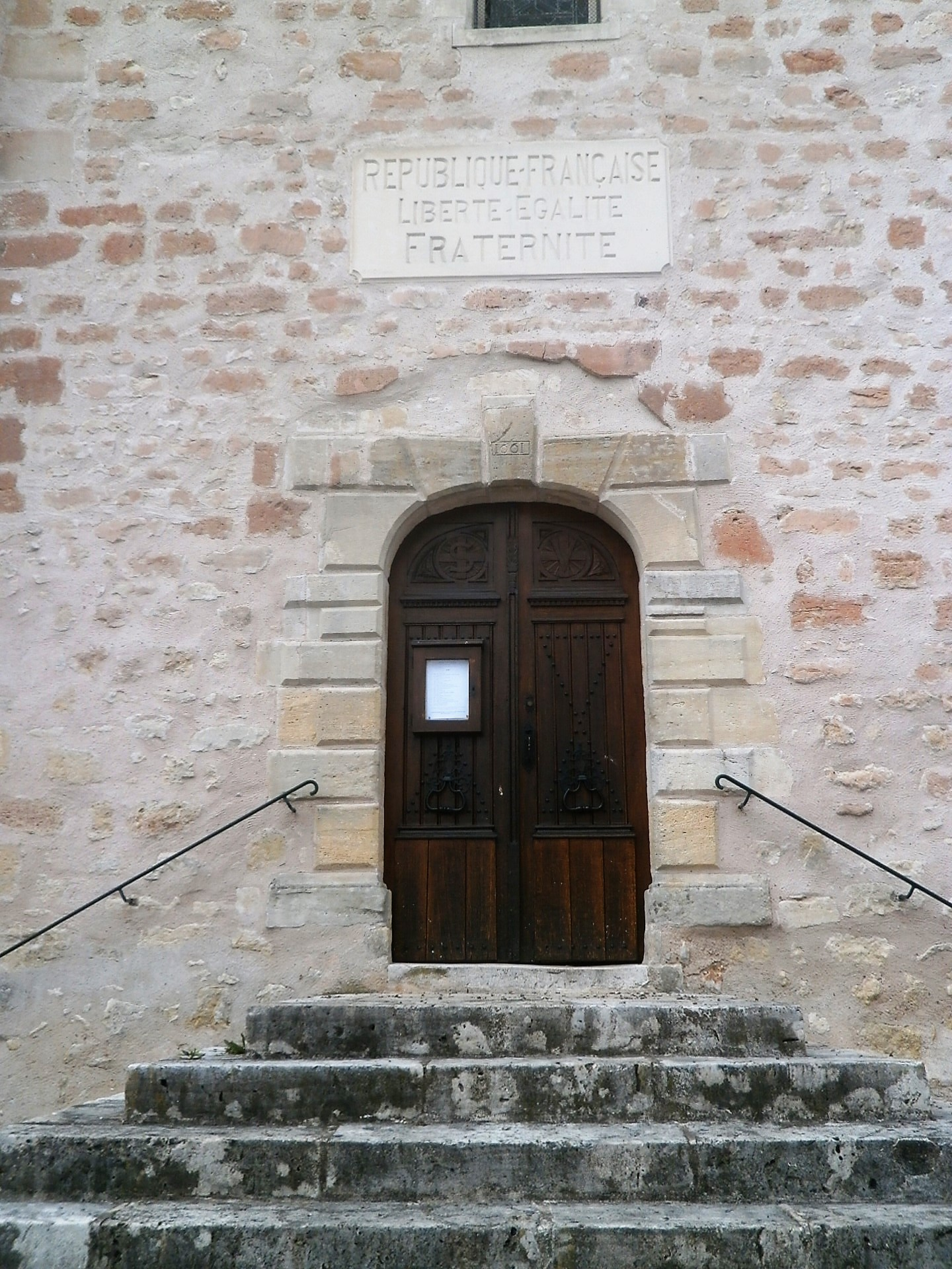 Portail sud de l'église Saint-Vincent d'Orbigny